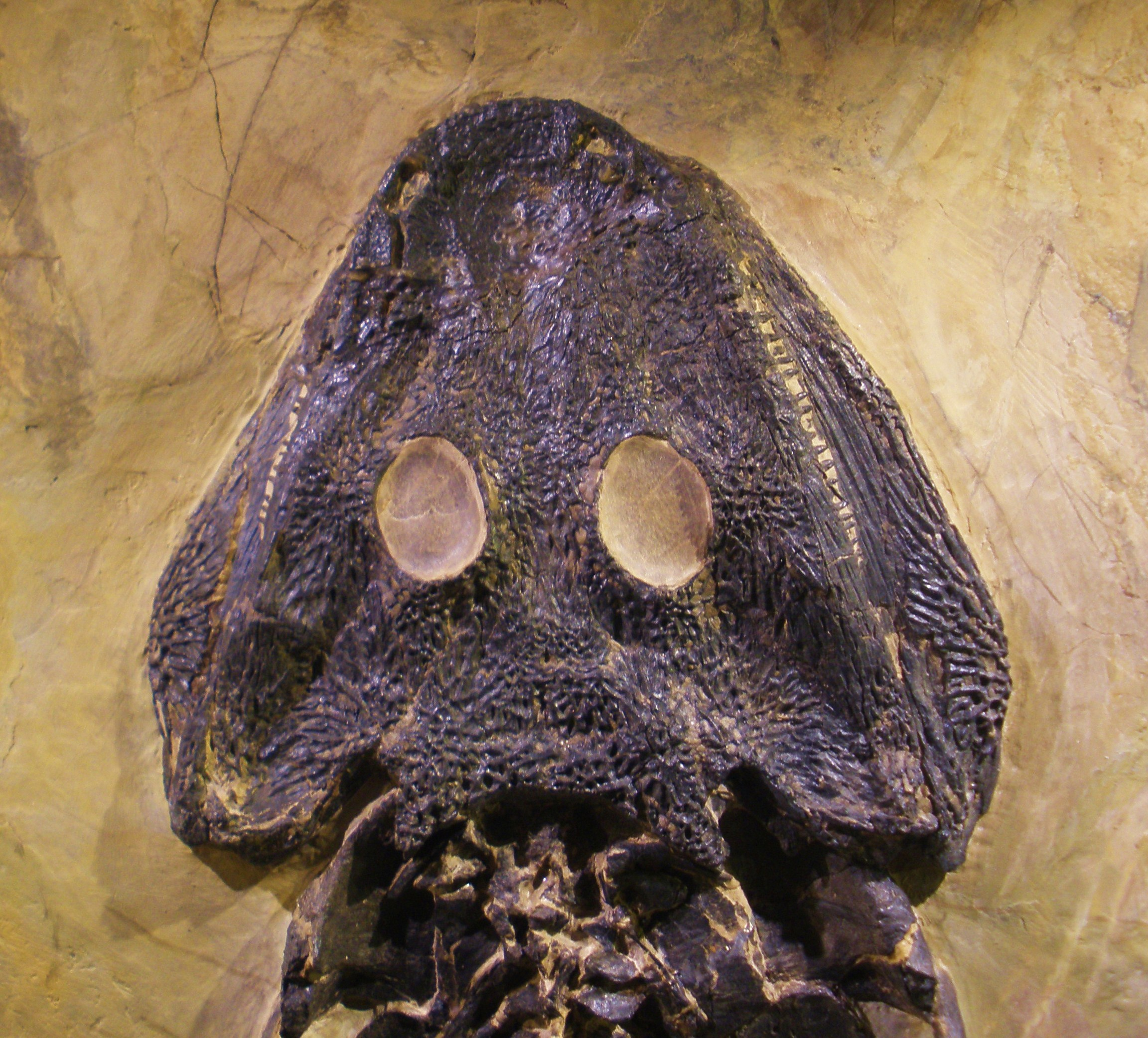 fossil Sclerocephalus